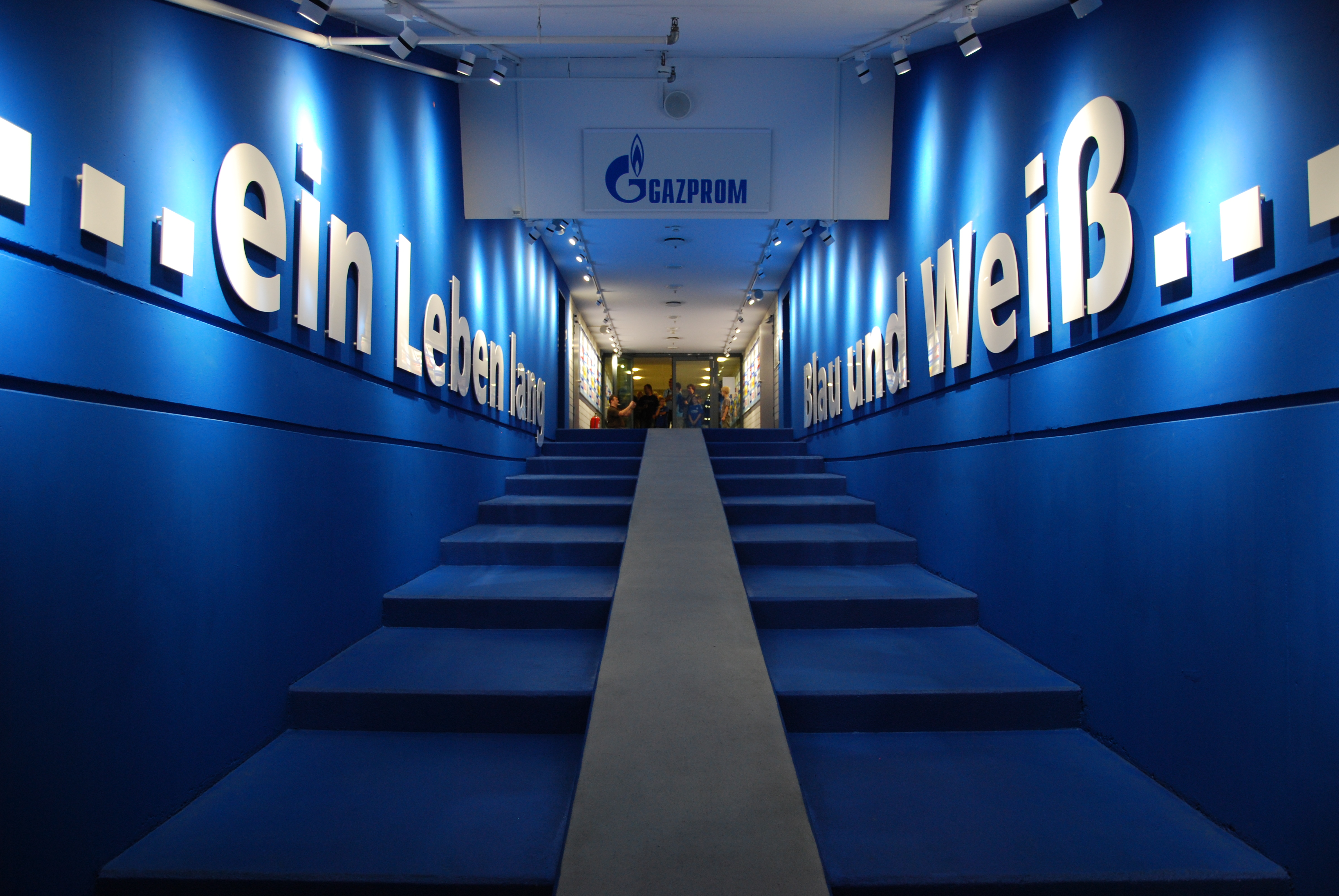 Blick in den Spielertunnel der Veltins-Arena